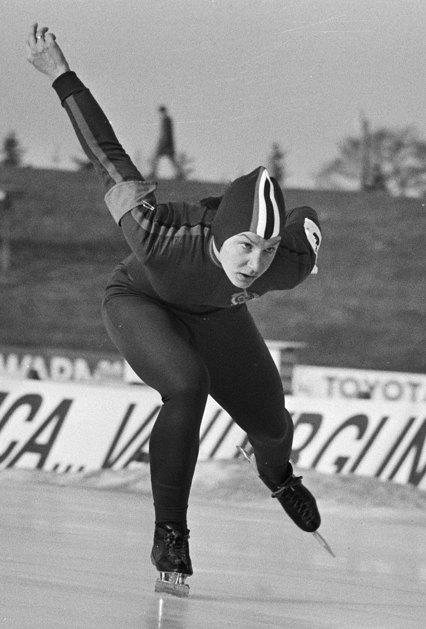 Wereldkampioenschappen schaatsen dames in Assen; Tatyana Averina (USSR) in actie